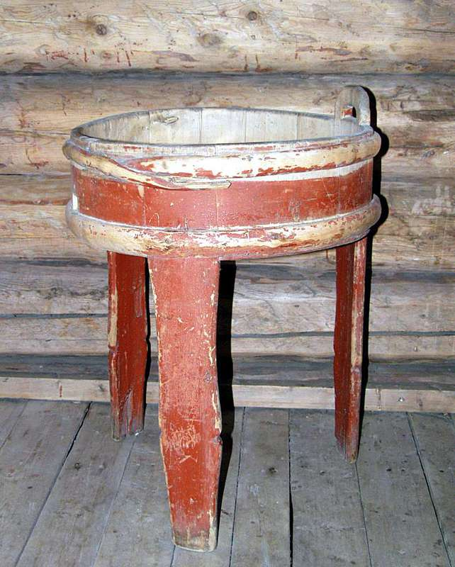 Stettekolle fra Tynset i Hedmark. Under bunnen er det svidd MLD AALBORG. Høyde 76 cm. Foto Harriss, Haakon Michael / Norsk Folkemuseum, NFL.15921.